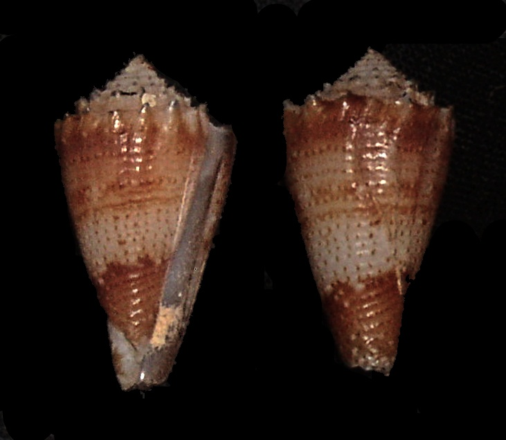 Conus chiangi 17mm